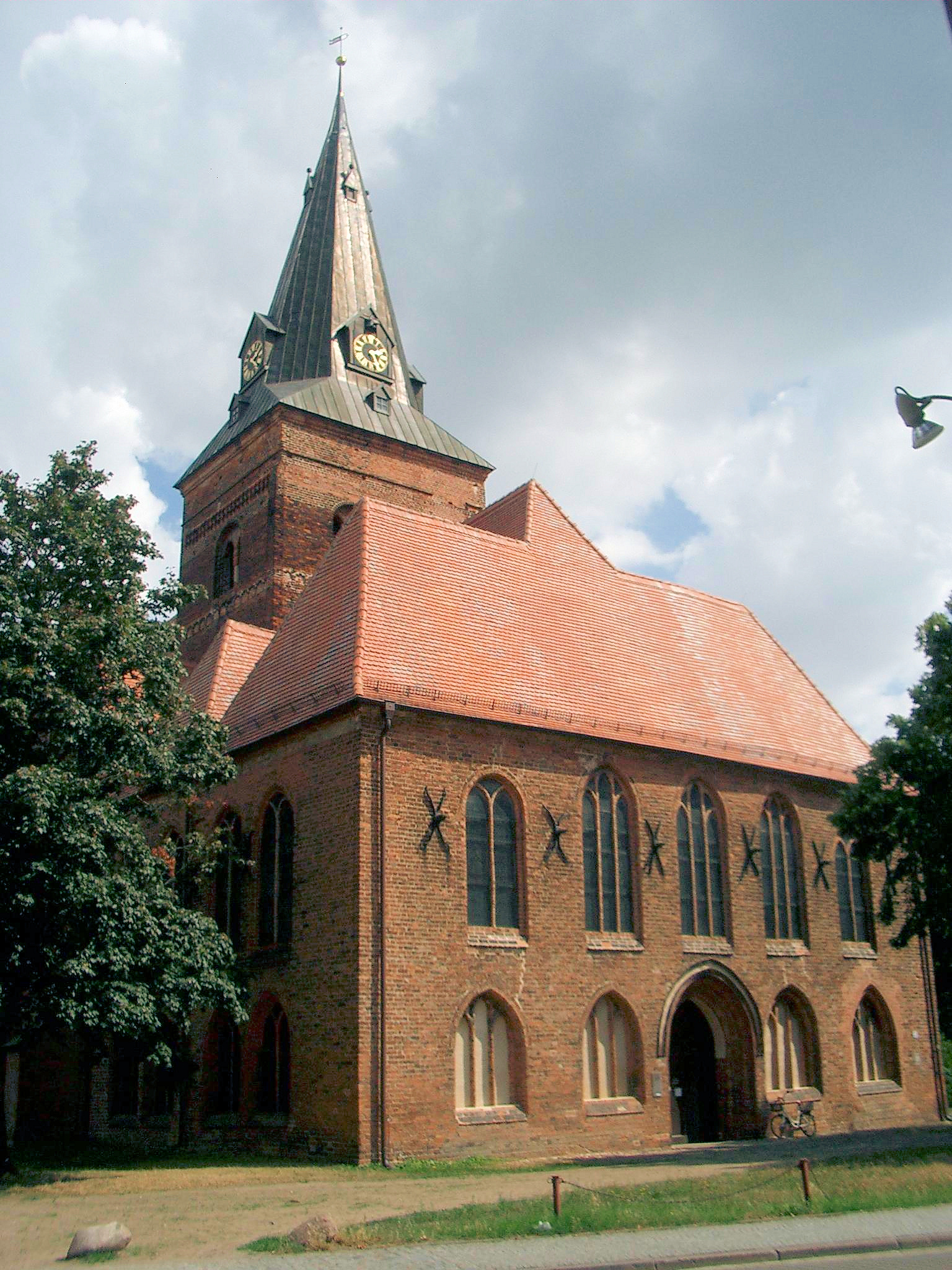 Katharienkirche in Salzwedel